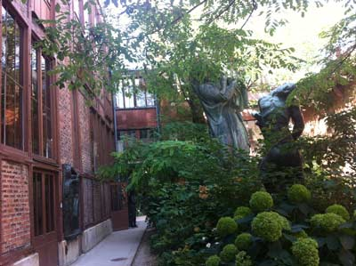 Première partie du Jardin Intérieur du Musée Bourdelle qui expose des sculptures parmi la végétation.